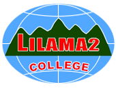 Biểu Trưng Trường Cao Đẳng Nghề LILAMA-2